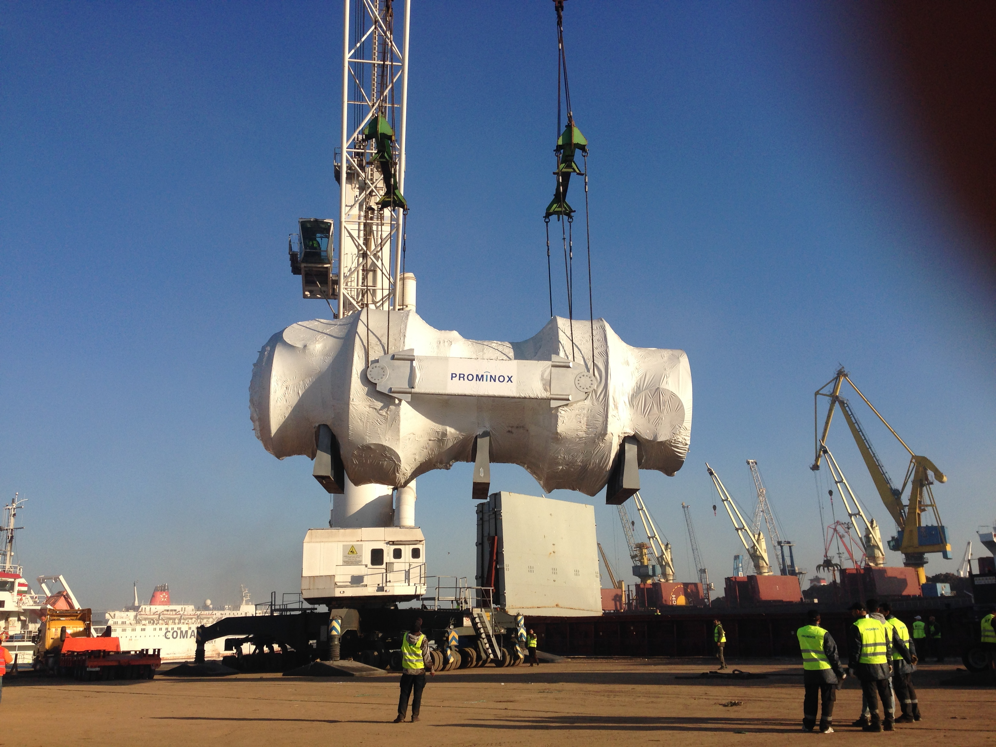 Echangeur GAZ-GAZ